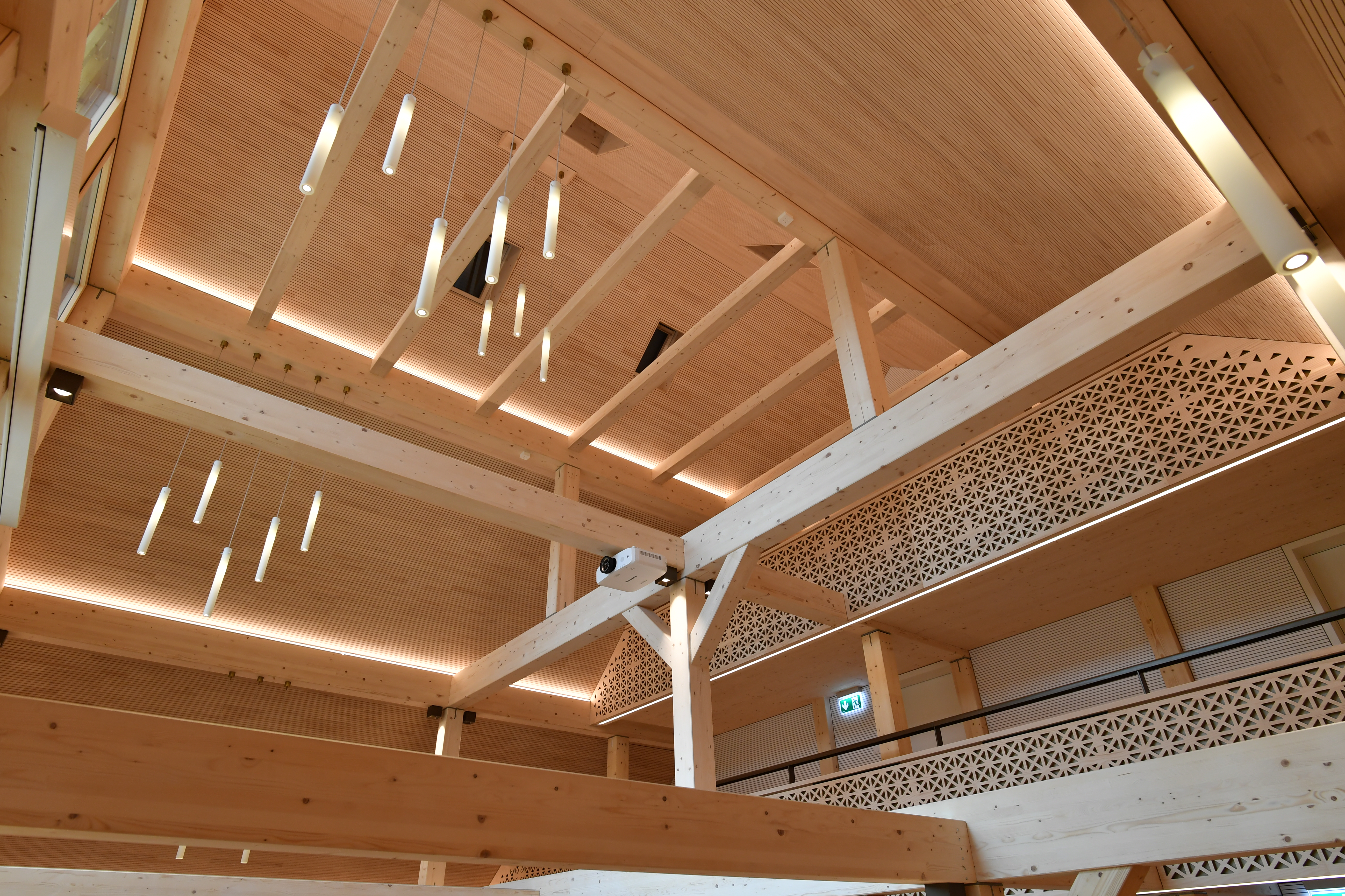 Kirchliches Zentrum St. Gabriel Schwerzenbach, Kirchensaal mit Bohlenständer-Bauweise